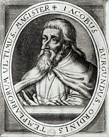 Jacques de Molay (* zwischen 1244 und 1250, † 1314), letzter Großmeister des Tempelritter-Ordens